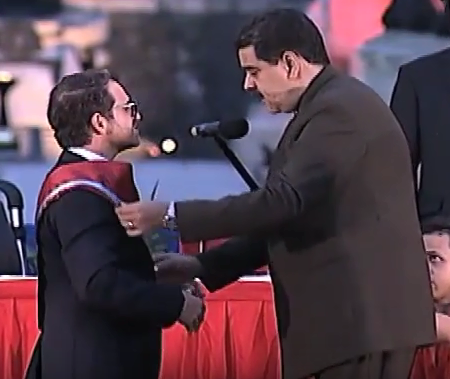 Nicolás Maduro entrega la banda de Gobernador de Carabobo a Rafael Lacava